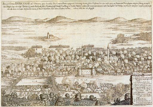 old view of Bosanska Dubica